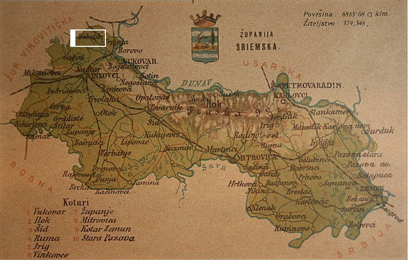 Zemljovidi županija na razglednicama oko 1900. godine